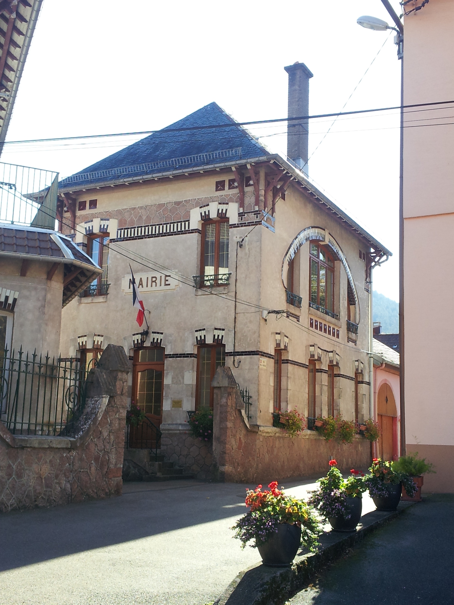 Mairie de Vexaincourt dans le département des Vosges